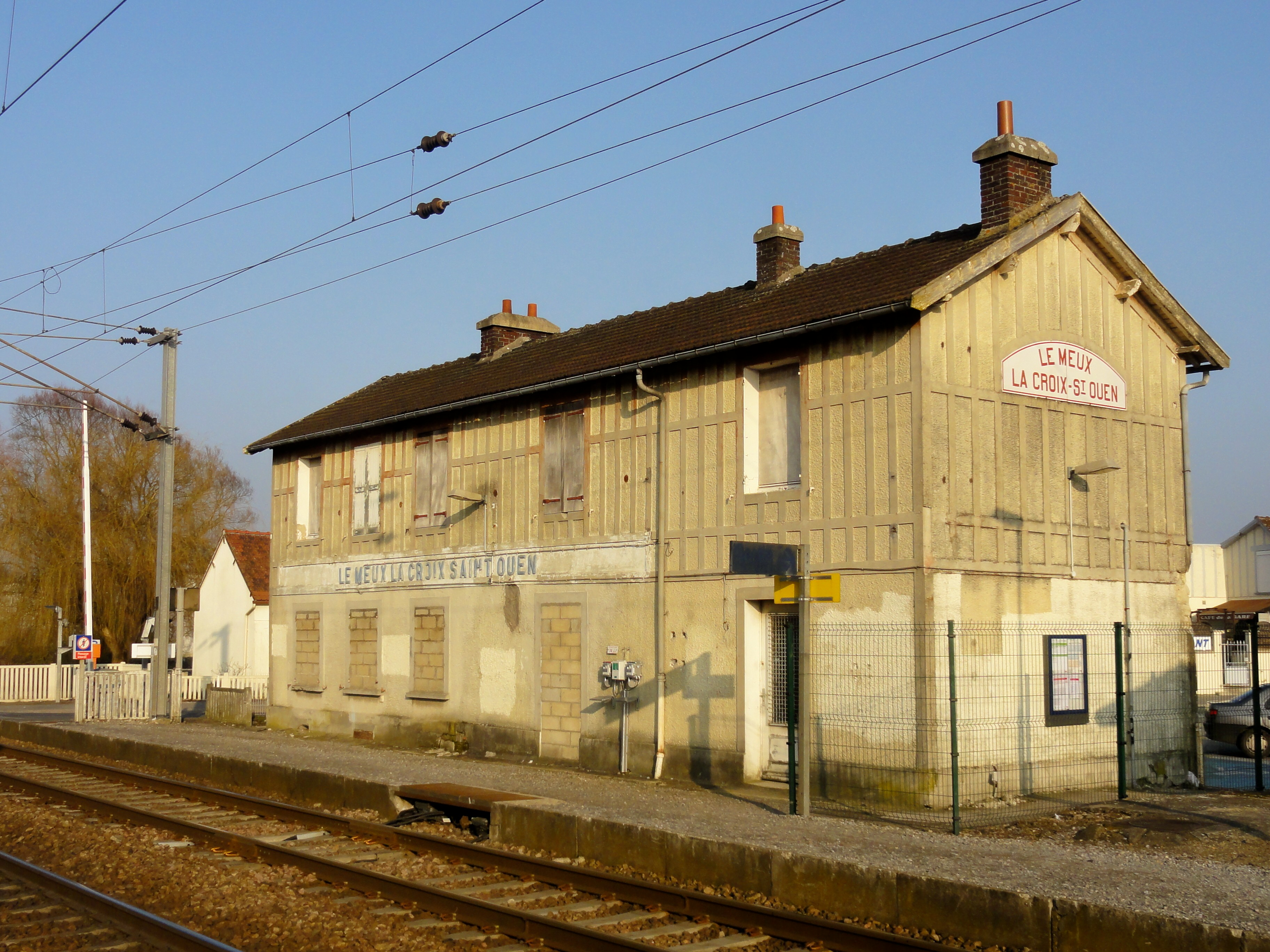 Bâtiment voyageurs, façade sur les voies, côté ouest, en direction du Meux.